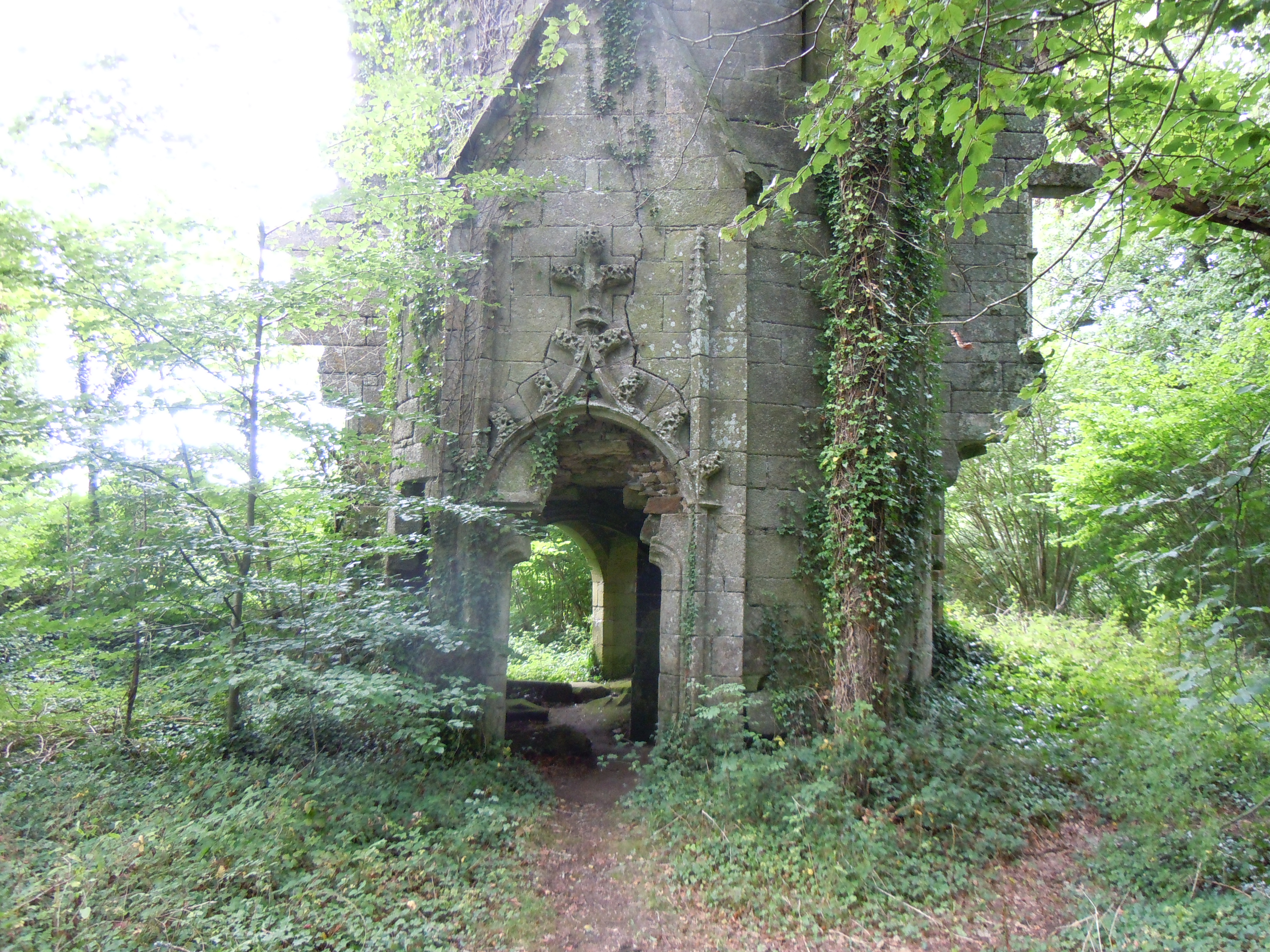 porte en plein cintre de la tour d'escalier du château ruiné de Rustéphan, commune de Pont-Aven, département du Finistère, France